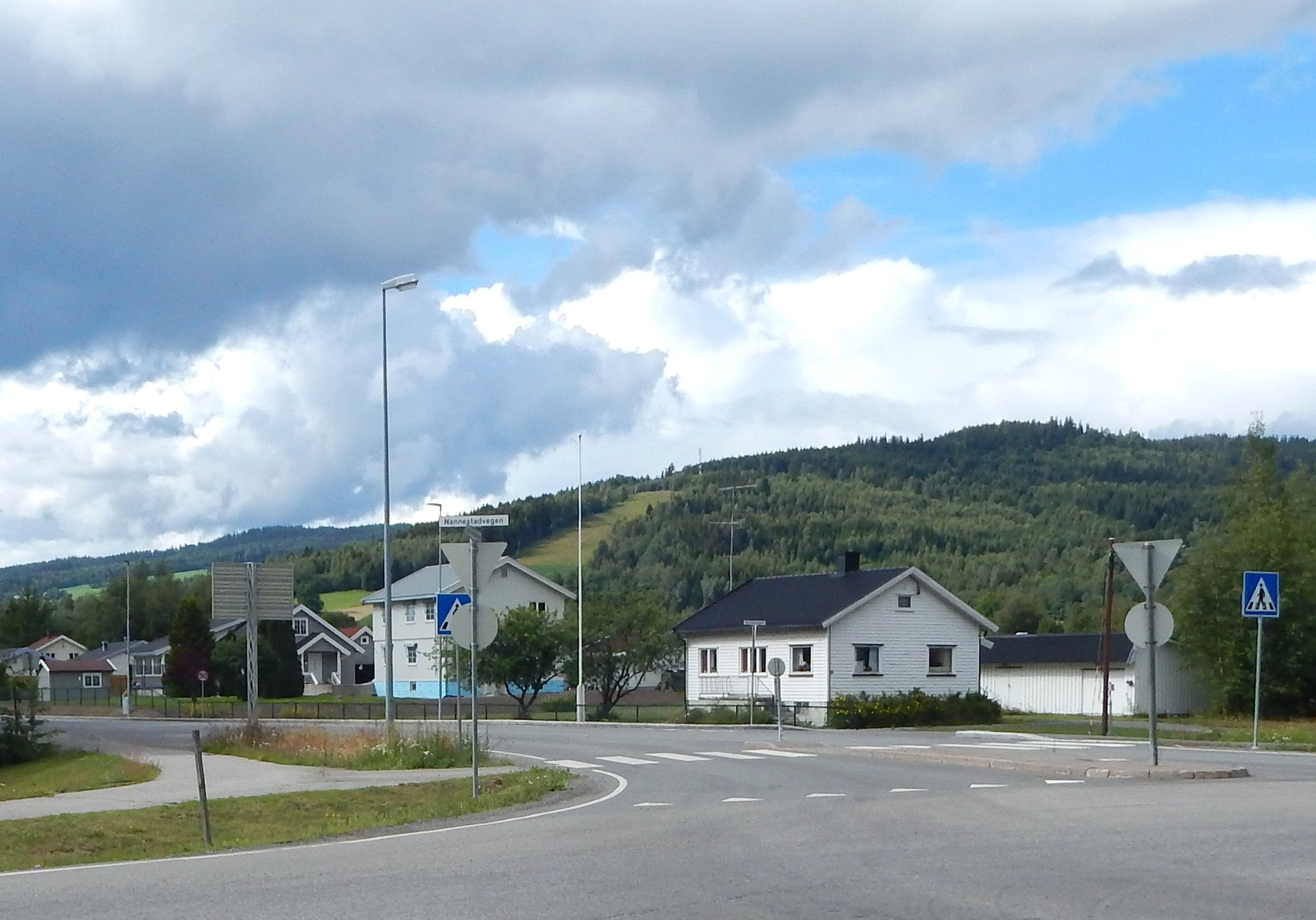 Gamle Hadelandsveg begynner i en rundkjøring på Maura i Nannestad